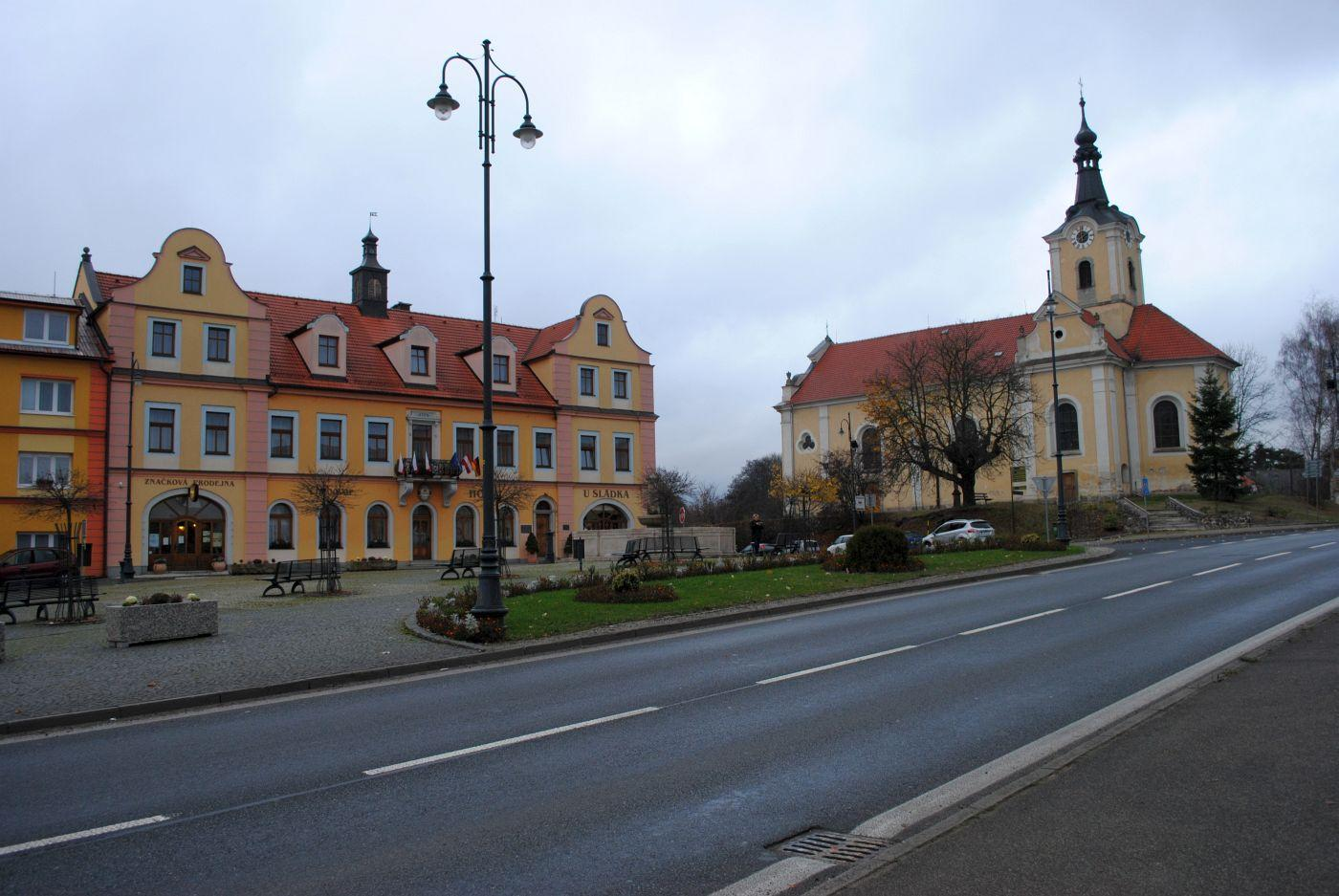 Zentrum von Chodovar Plana